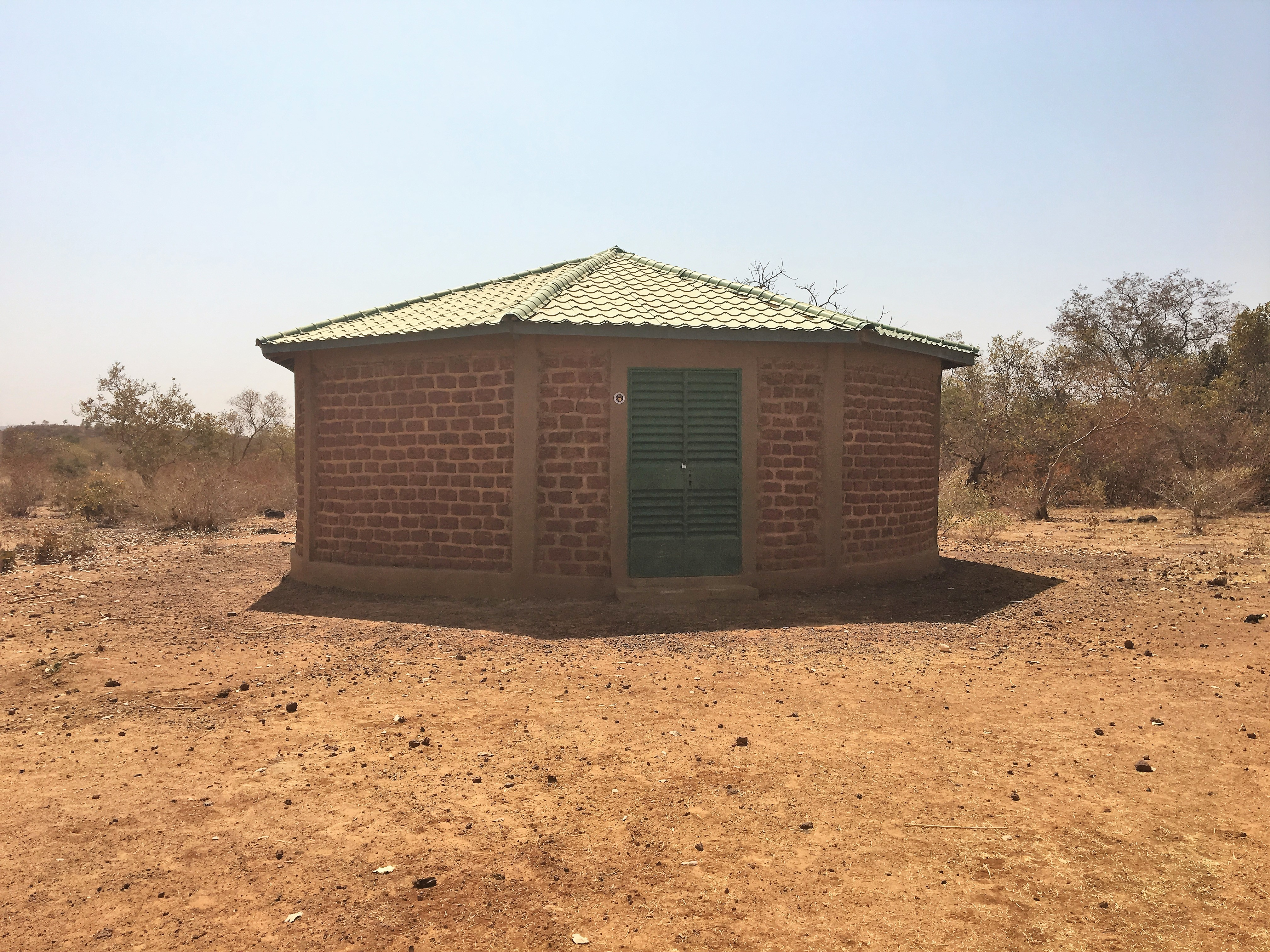 Centre d'alphabétisation de Bogonam Mossi